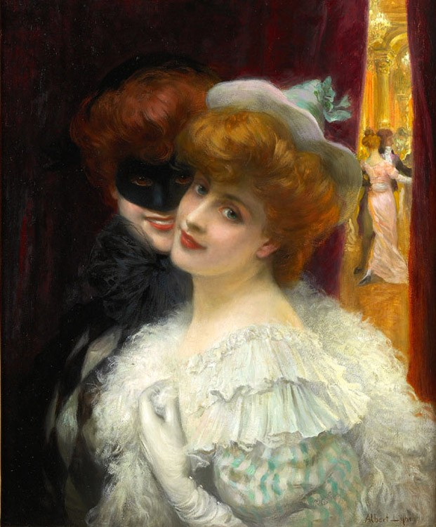 Le bal masqué.oil on canvasmedium QS:P186,Q296955;P186,Q12321255,P518,Q861259